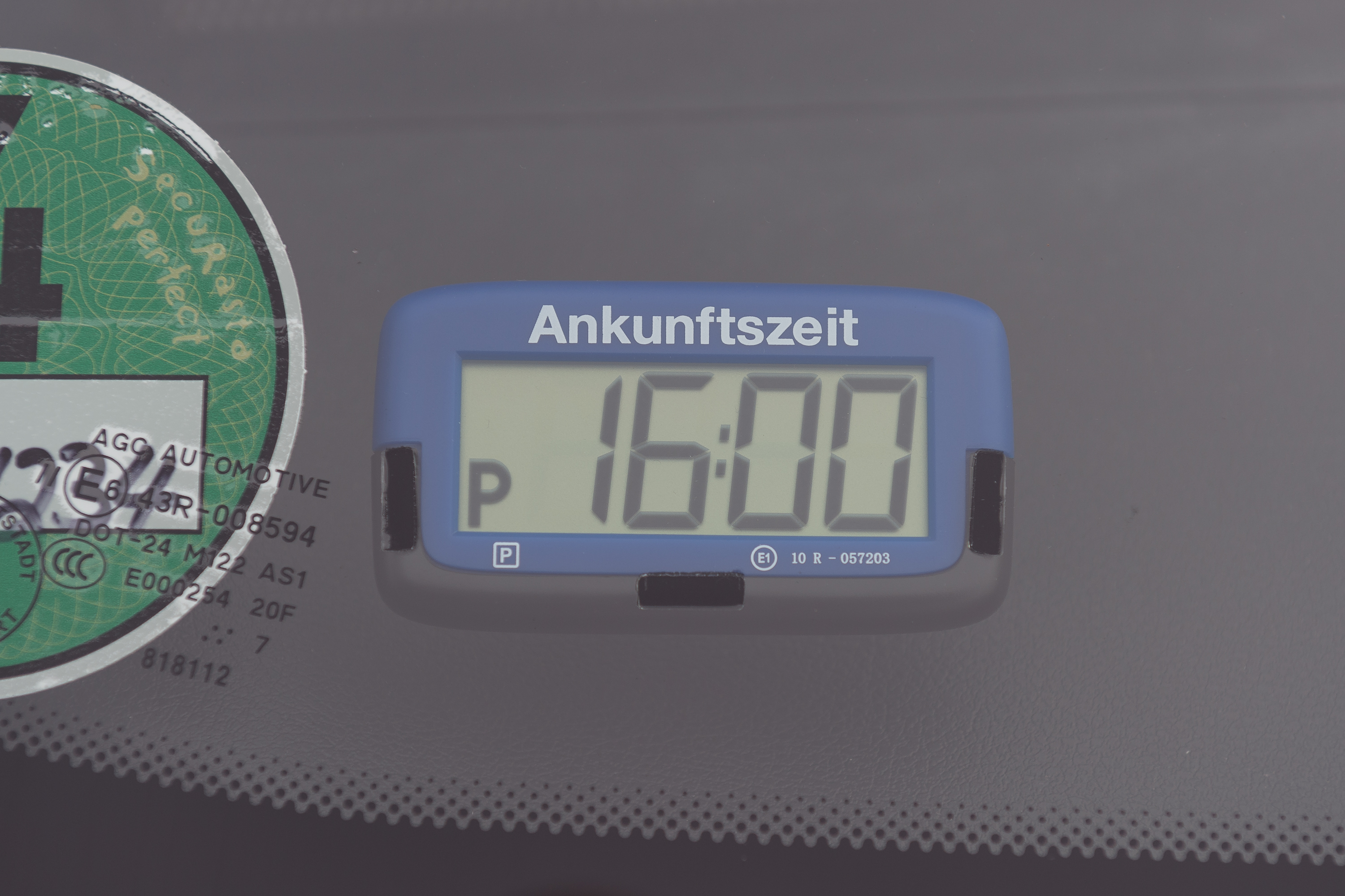 Elektronische Parkscheibe Park Micro, vom Kraftfahrt-Bundesamt zugelassen, Abmessungen in mm: 80 x 45 x 10.